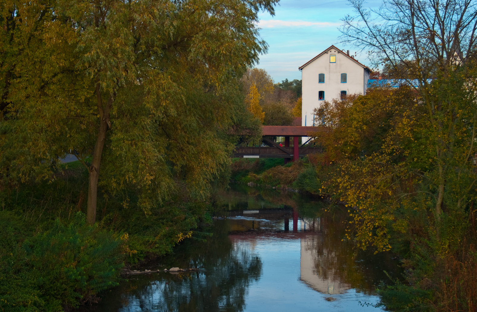 Die Alte Mühle in Bad Vilbel